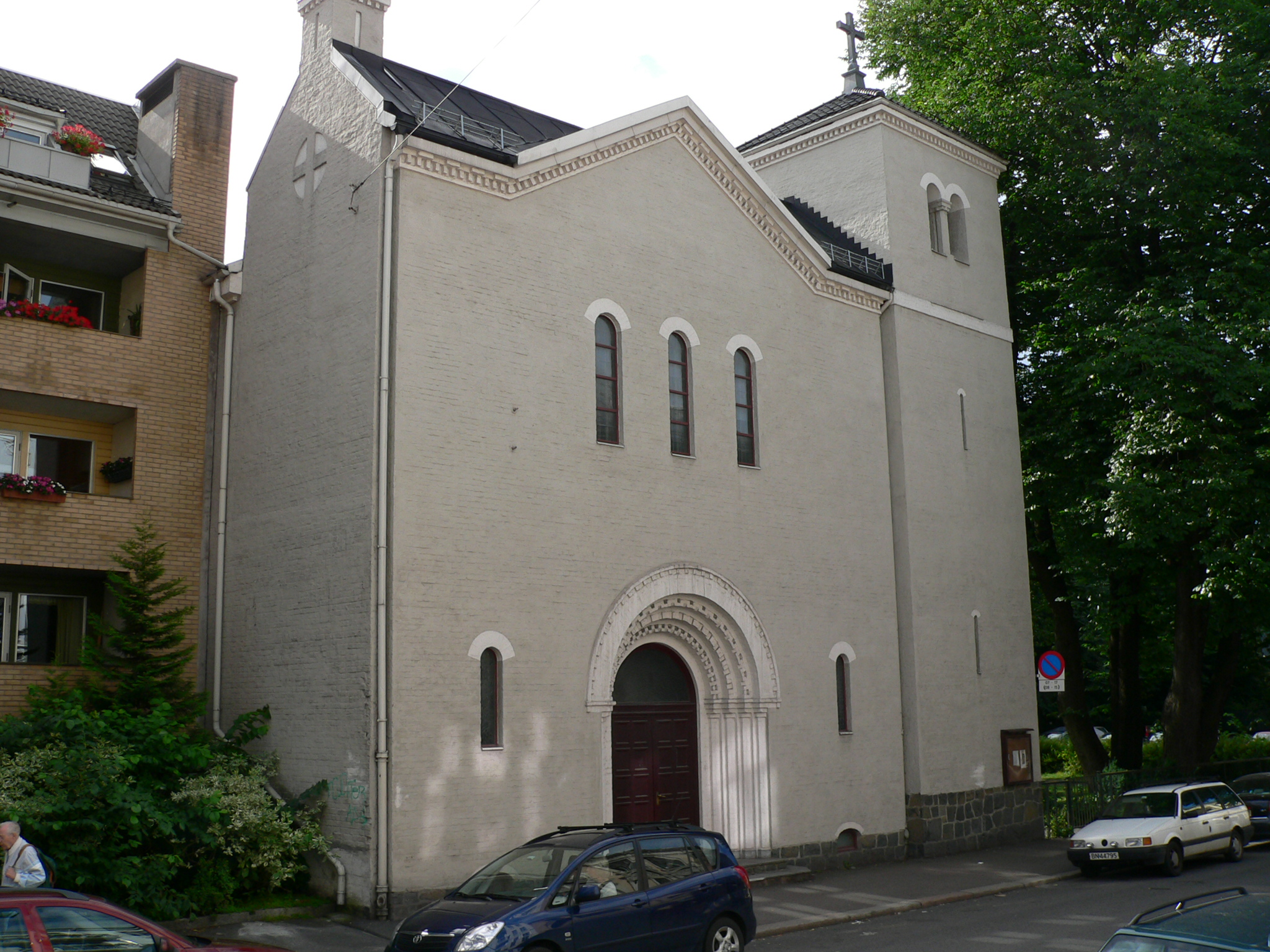 Fasaden til Sankt Dominikus kirke i Oslo